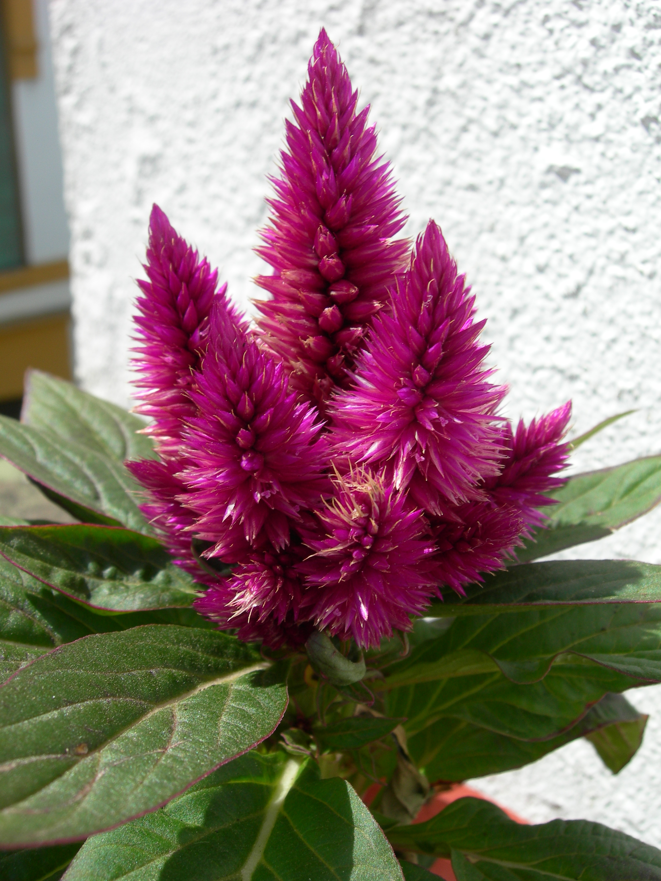 Celosia spicata